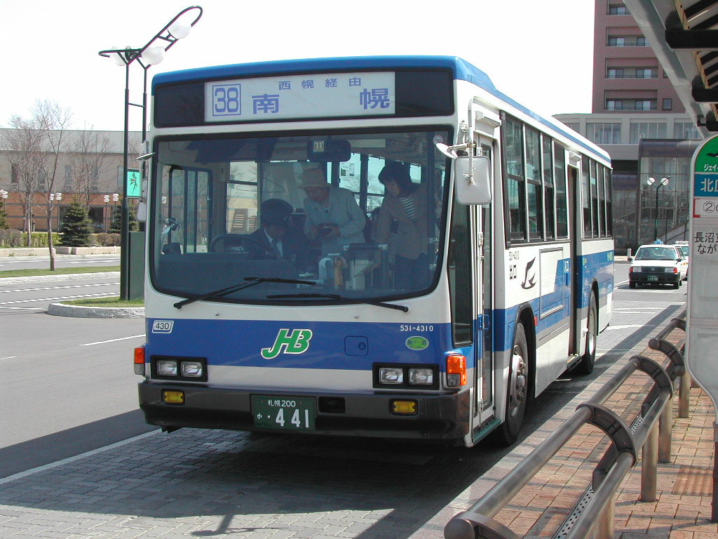 北広島駅前にて